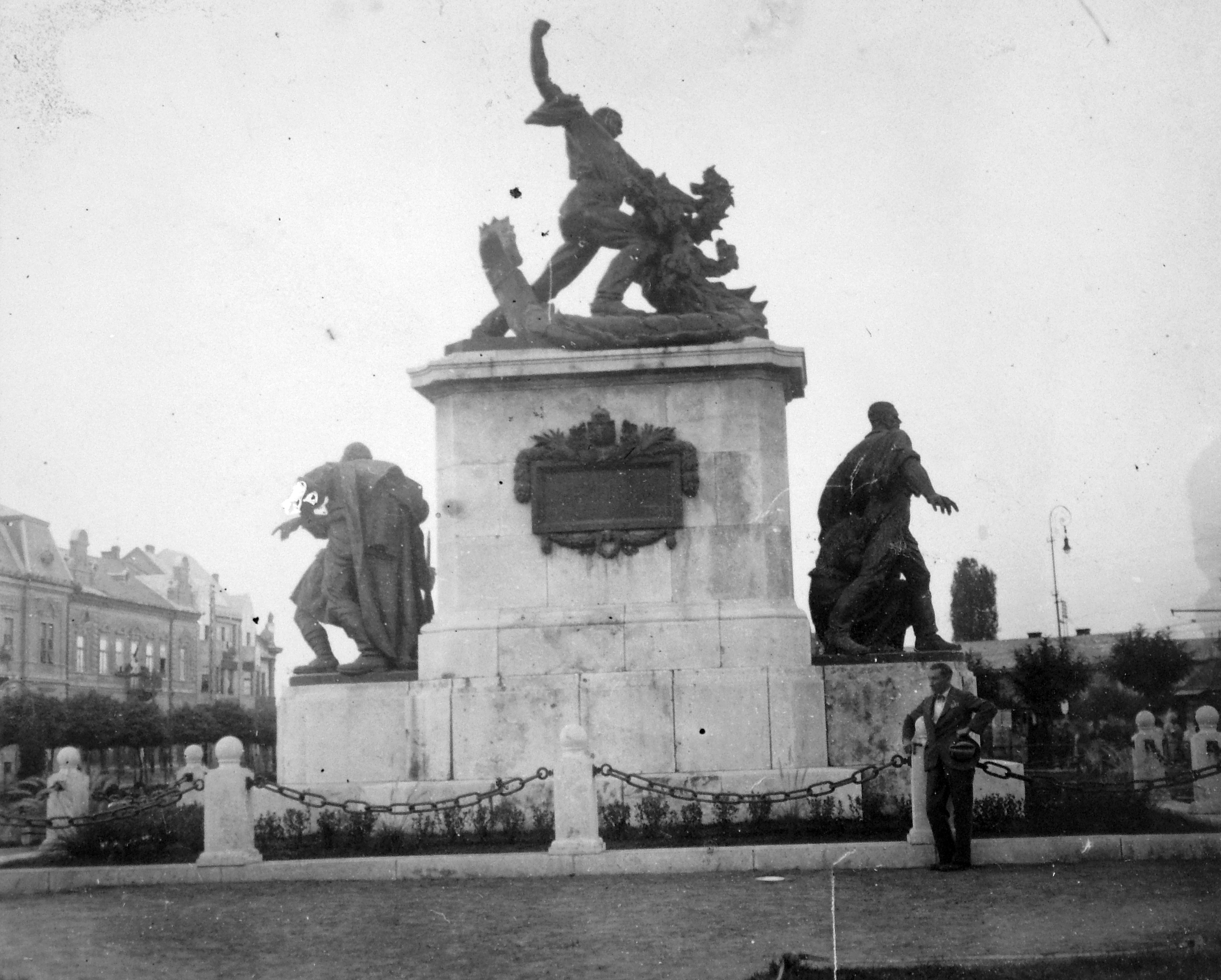 Hősök tere, Hősök szobra. Location: Hungary Tags: sculpture Title: Hősök tere, Hősök szobra.